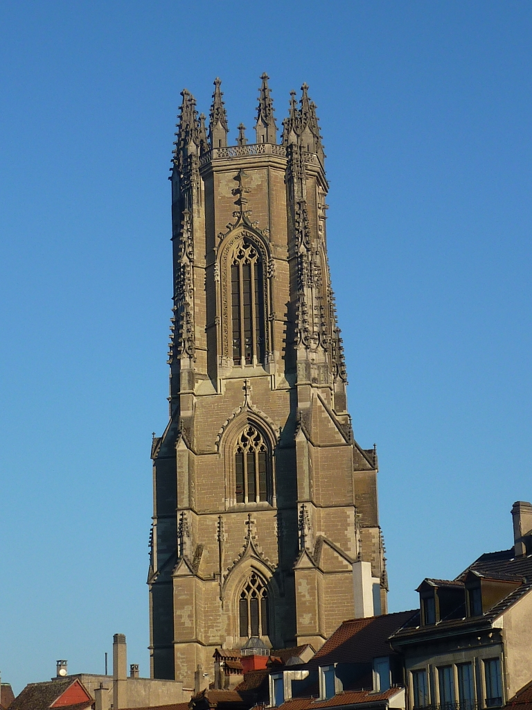 Cathédrale St-Nicolas de Fribourg (Suisse). Vue de la tour.